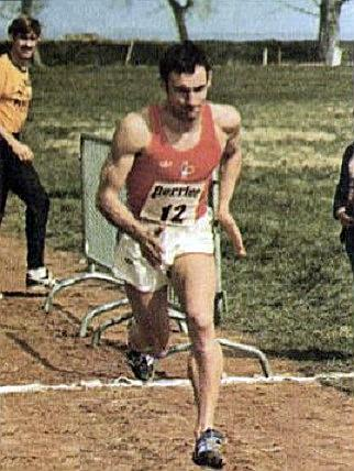 Raoul Gueguen (ici en 1975, Pentathlonien moderne français), 'Montreal 76', Panini figurina n°277.